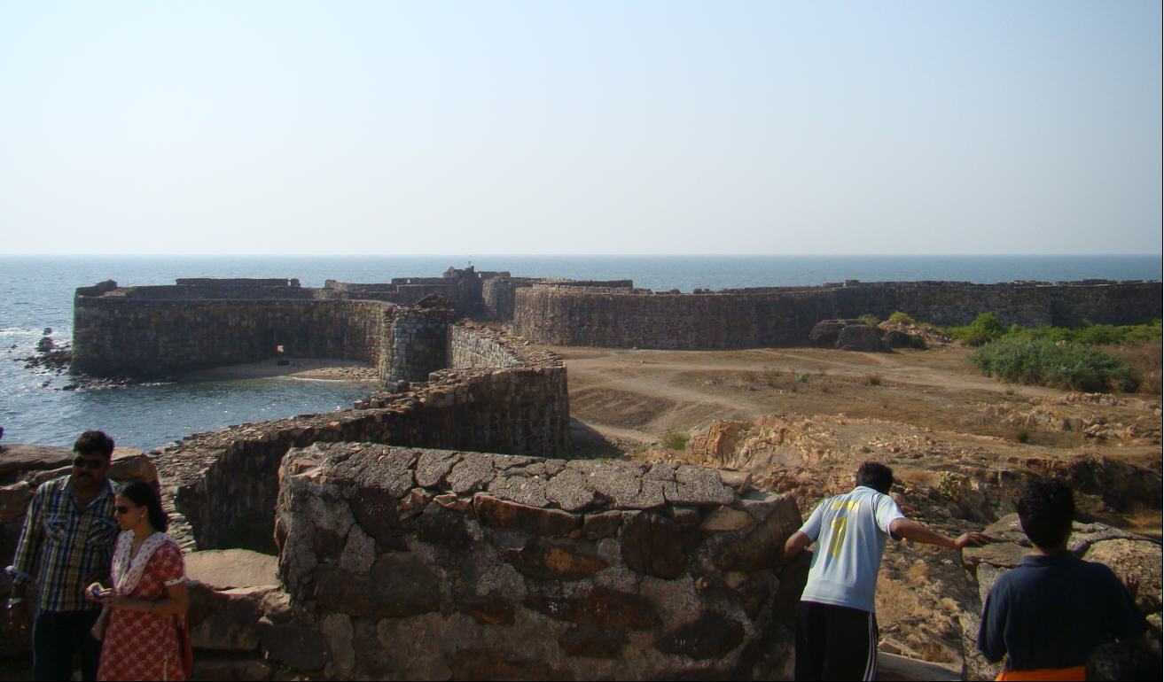 सिंधुदुर्ग किले पर सदस्य